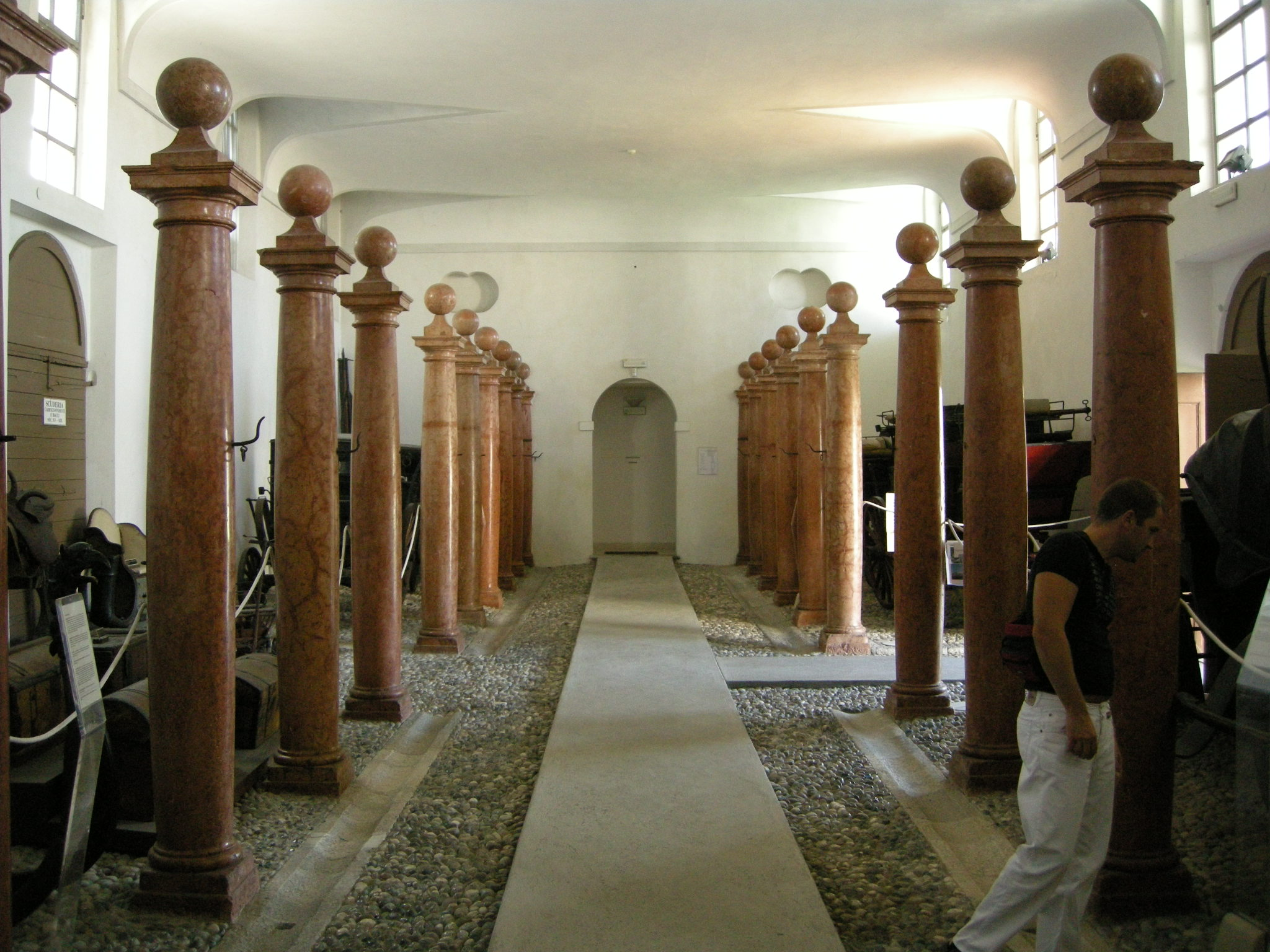 Villa manin, museo carrozze